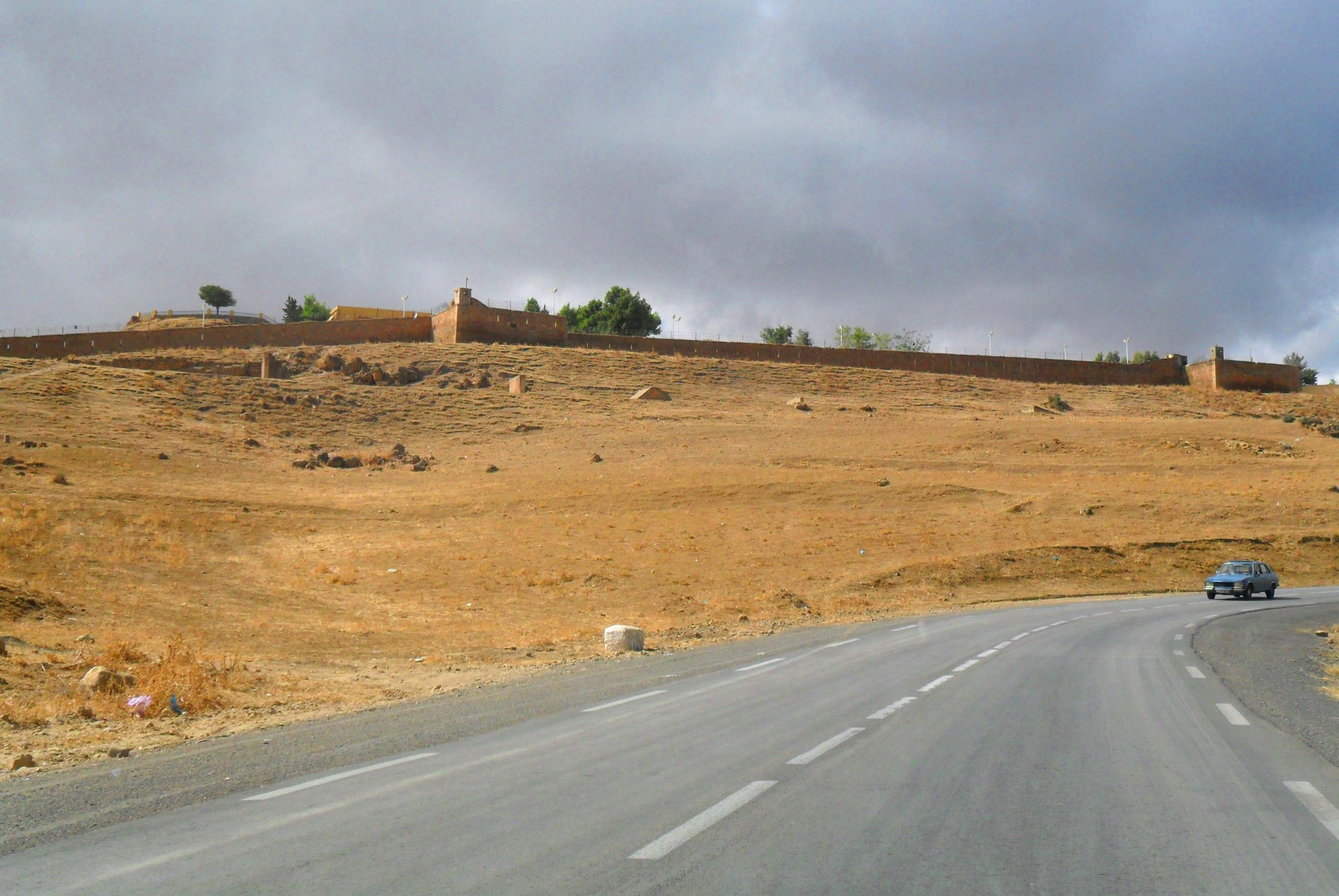 le fort de Boghar, commune de Boghar, daira de Ouled Antar, wilaya de Médéa, Algerie حصن بوغار، بلدية بوغار، دائرة اولاد عنتر، ولاية المدية، الجزائر